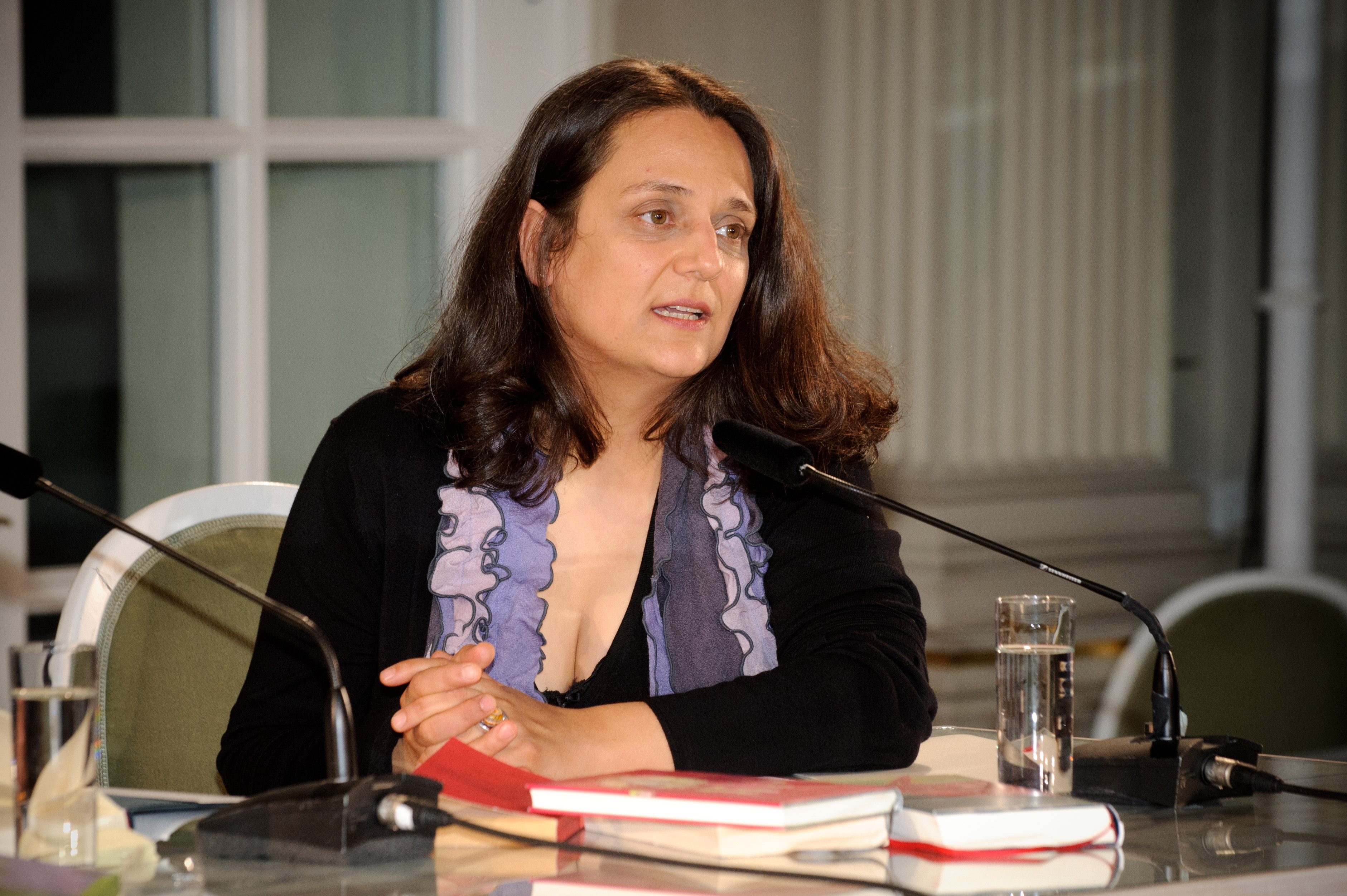 Hilal Sezgin (Schriftstellerin) Lesung: Wie geht es Georg Laub? - Silvia Bovenschen Foto: Stephan Röhl